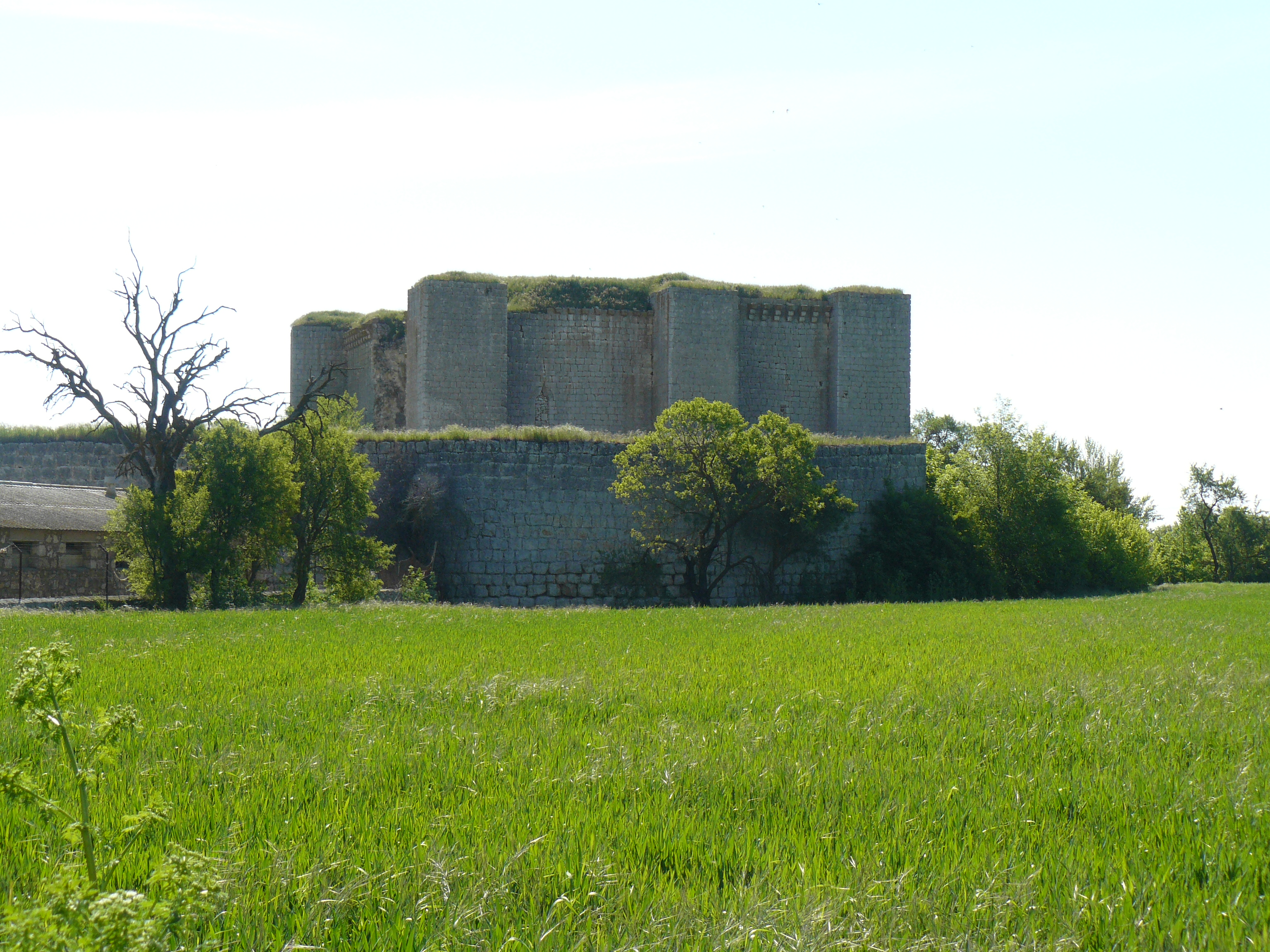 Villalba de los Alcores, Valladolid.